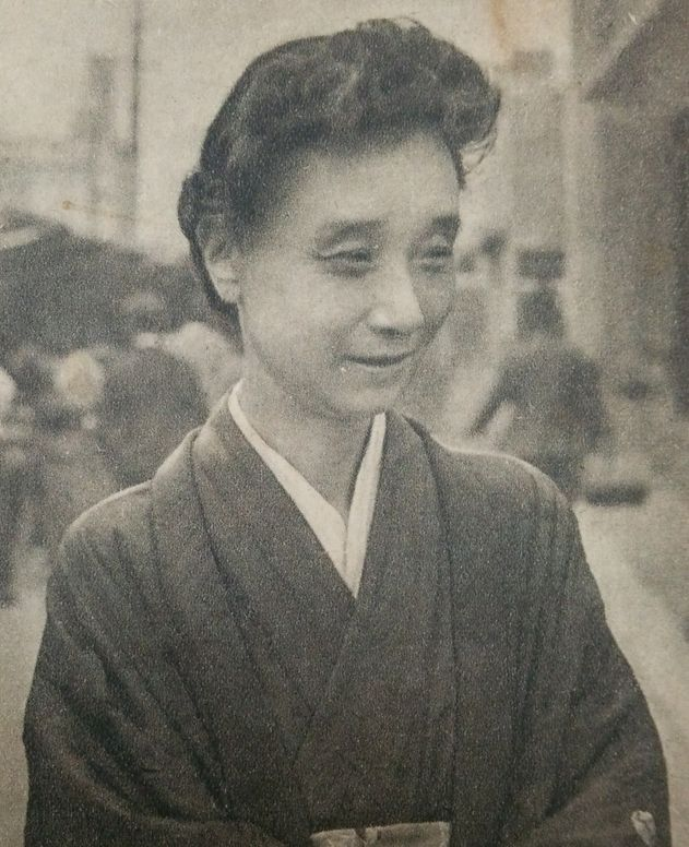 吉井徳子（柳原義光の娘。吉井勇の妻。不良華族事件の中心人物）